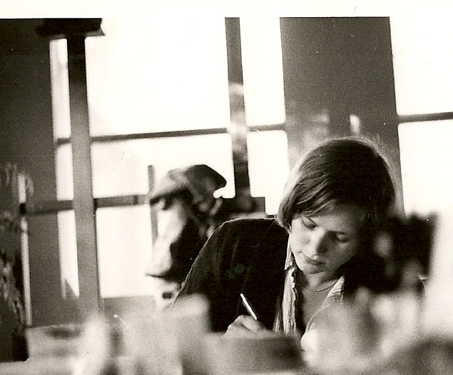 Marlite Halbertsma, Usquert (1977)